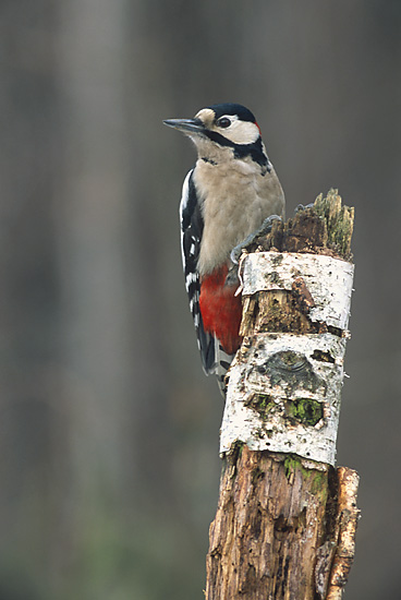 Dendrocopos major ♂ (male)